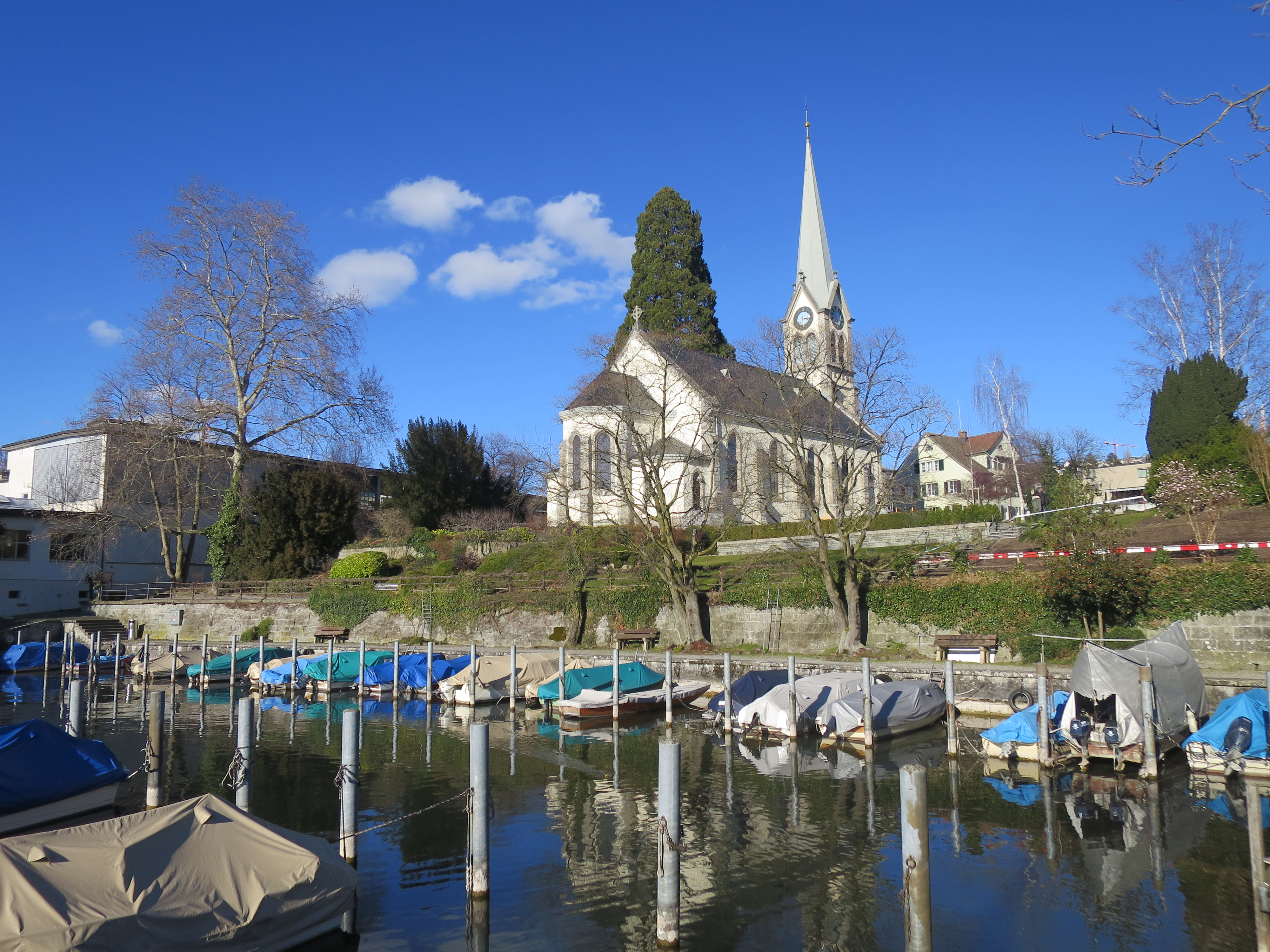 Reformierte Kirche und Hafen von Erlenbach ZH